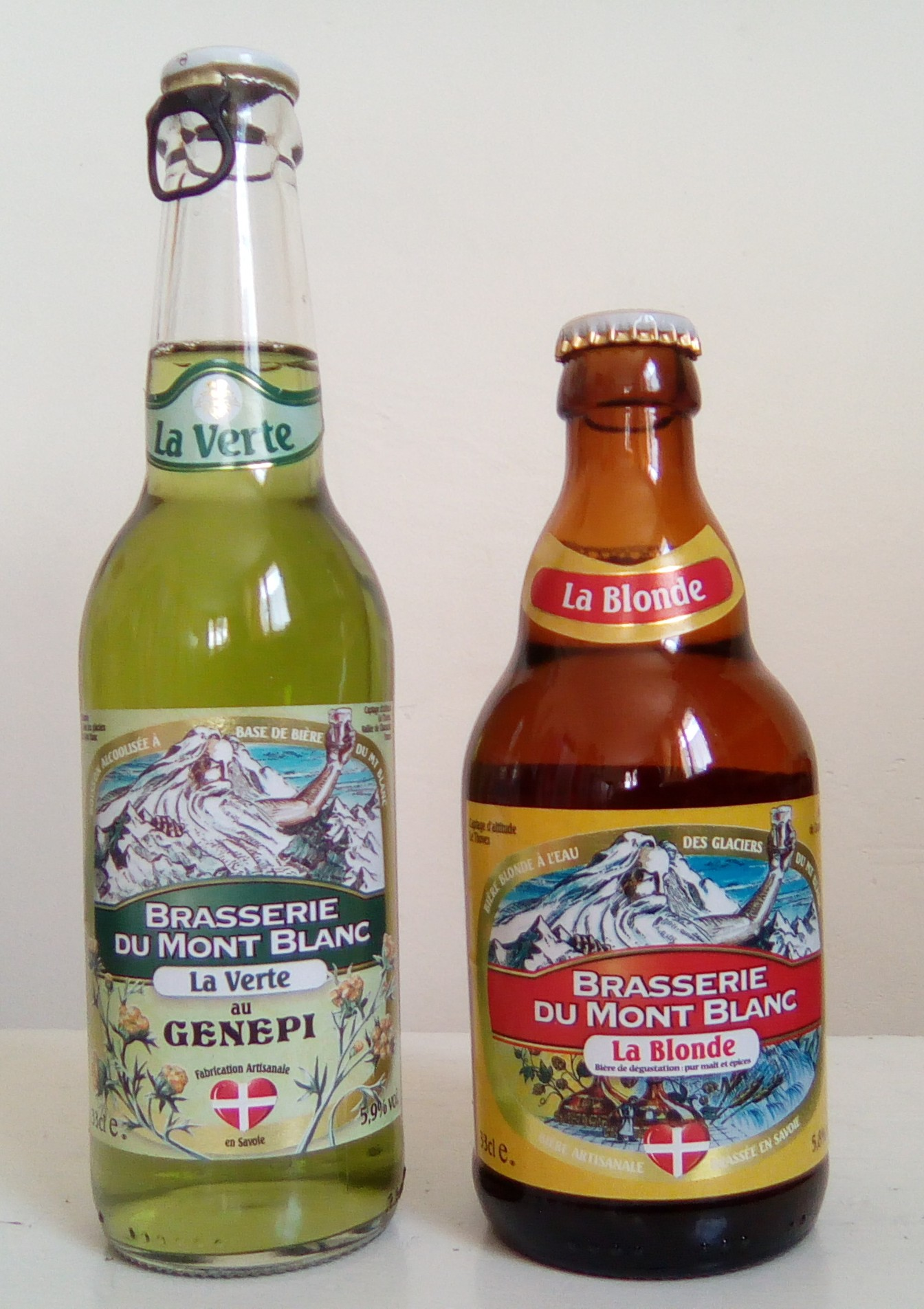 Bouteilles de la bière savoyarde "Brasserie du Mont-Blanc" (arôme Génépi et blonde)